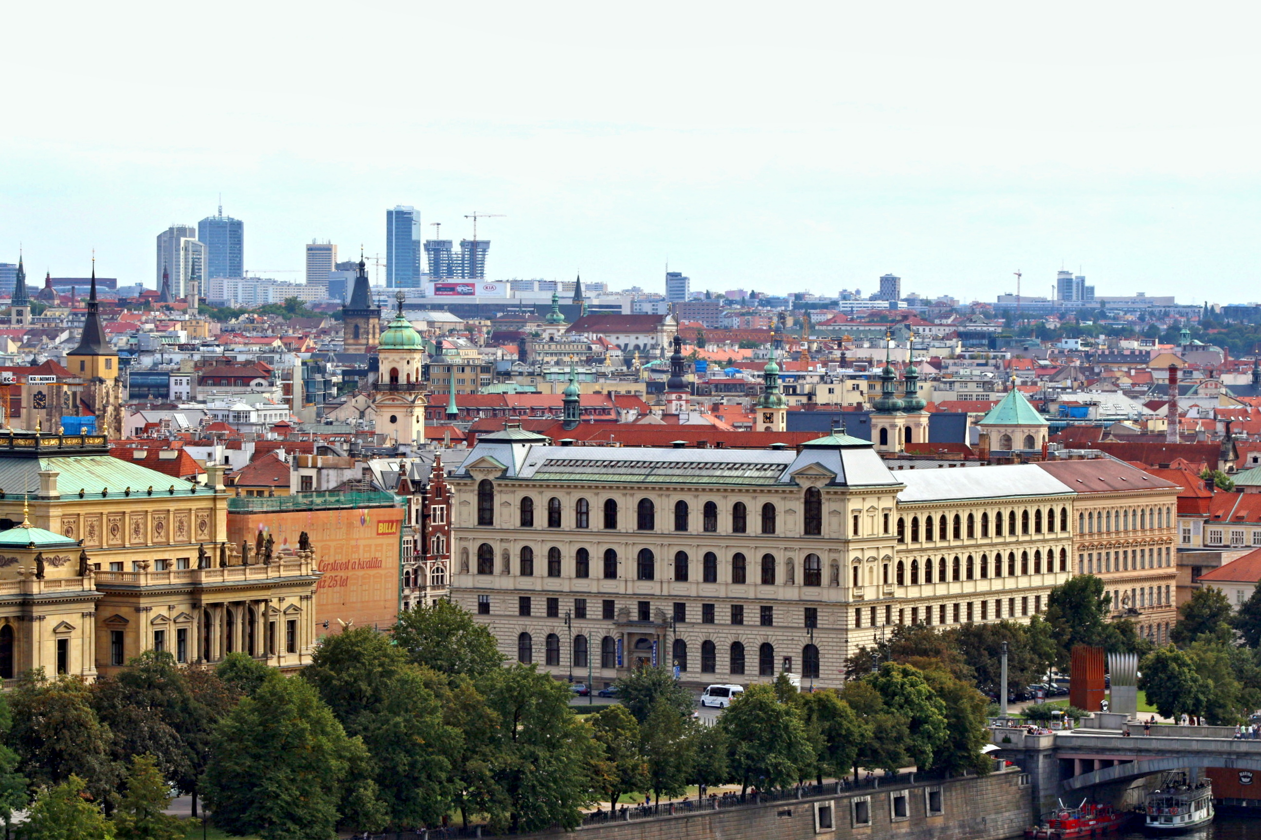 Vysoká škola uměleckoprůmyslová v Praze